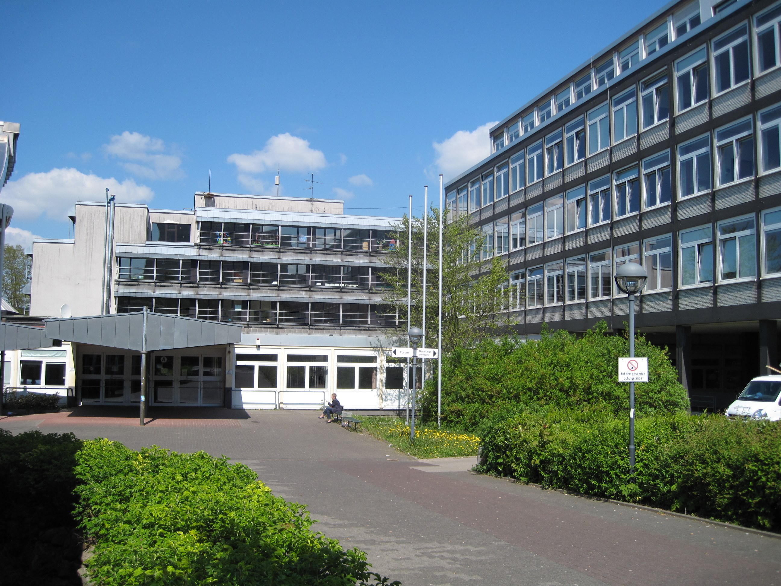 Berufskolleg des Märkischen Kreises in Iserlohn, Hansaallee 19.